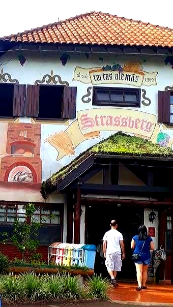 Strassberg Tortas Alemãs, distrito de Warta, município de Londrina, no Paraná.